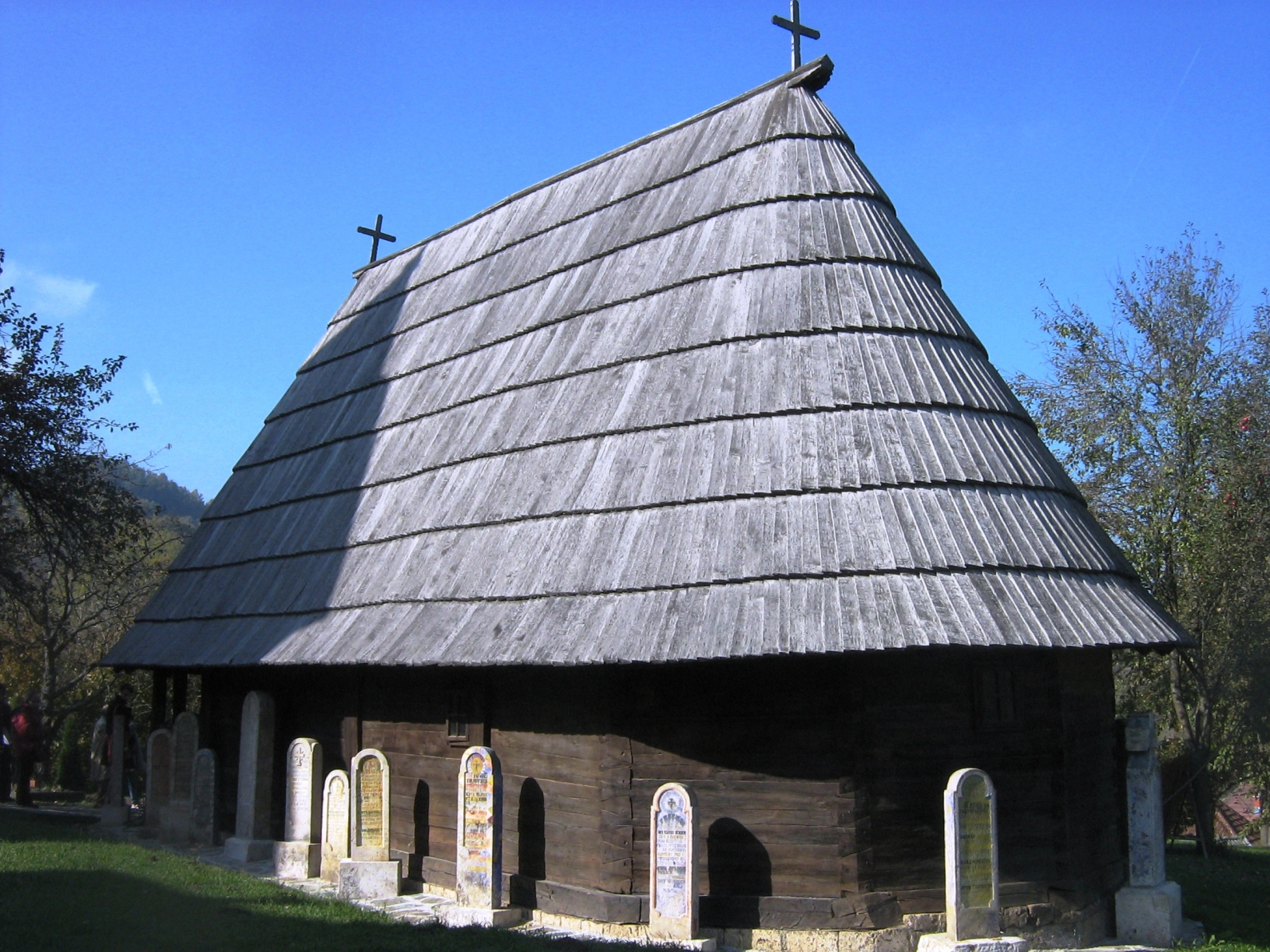 Сеча Река, Косјерић.